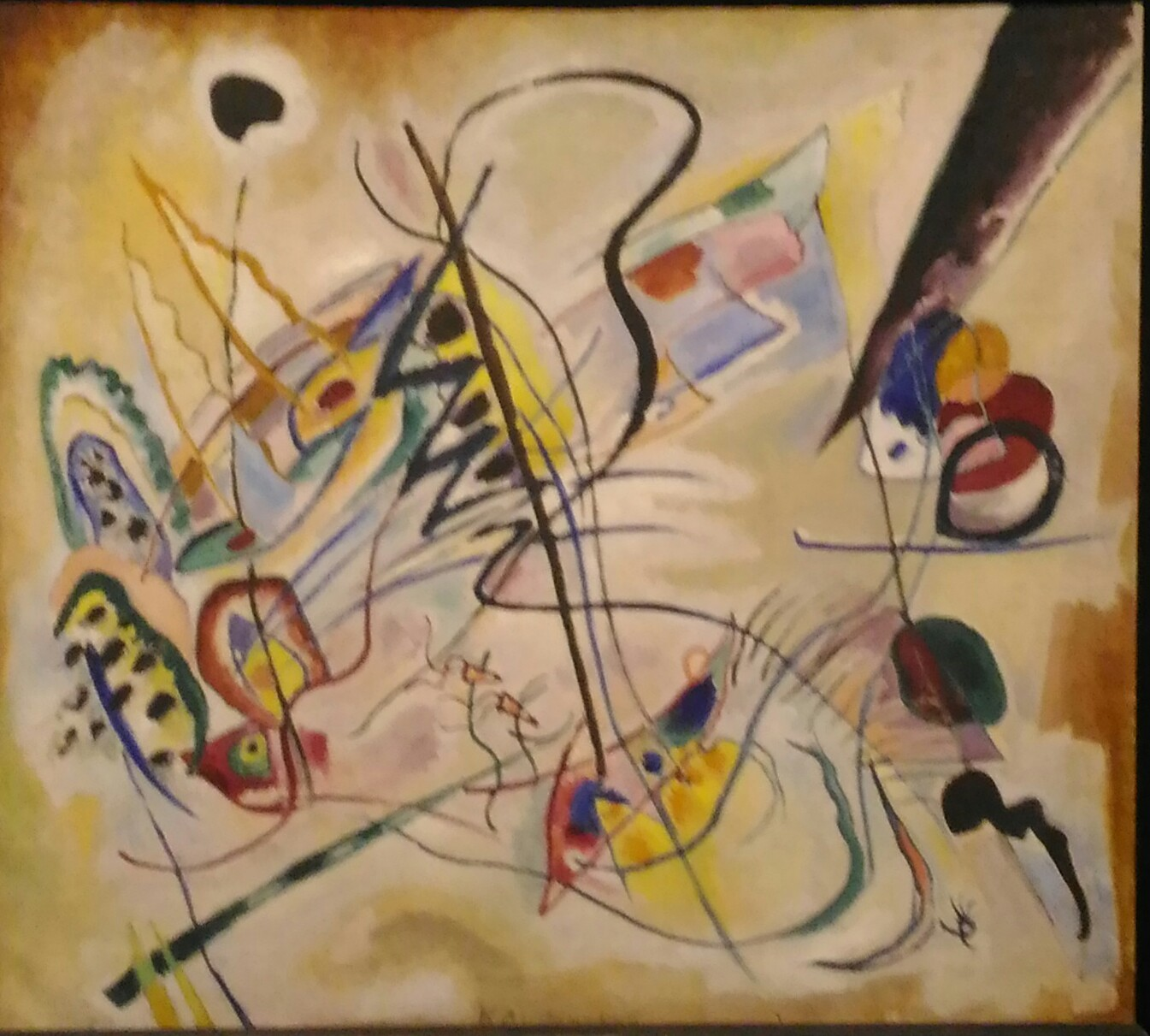 kandinsky